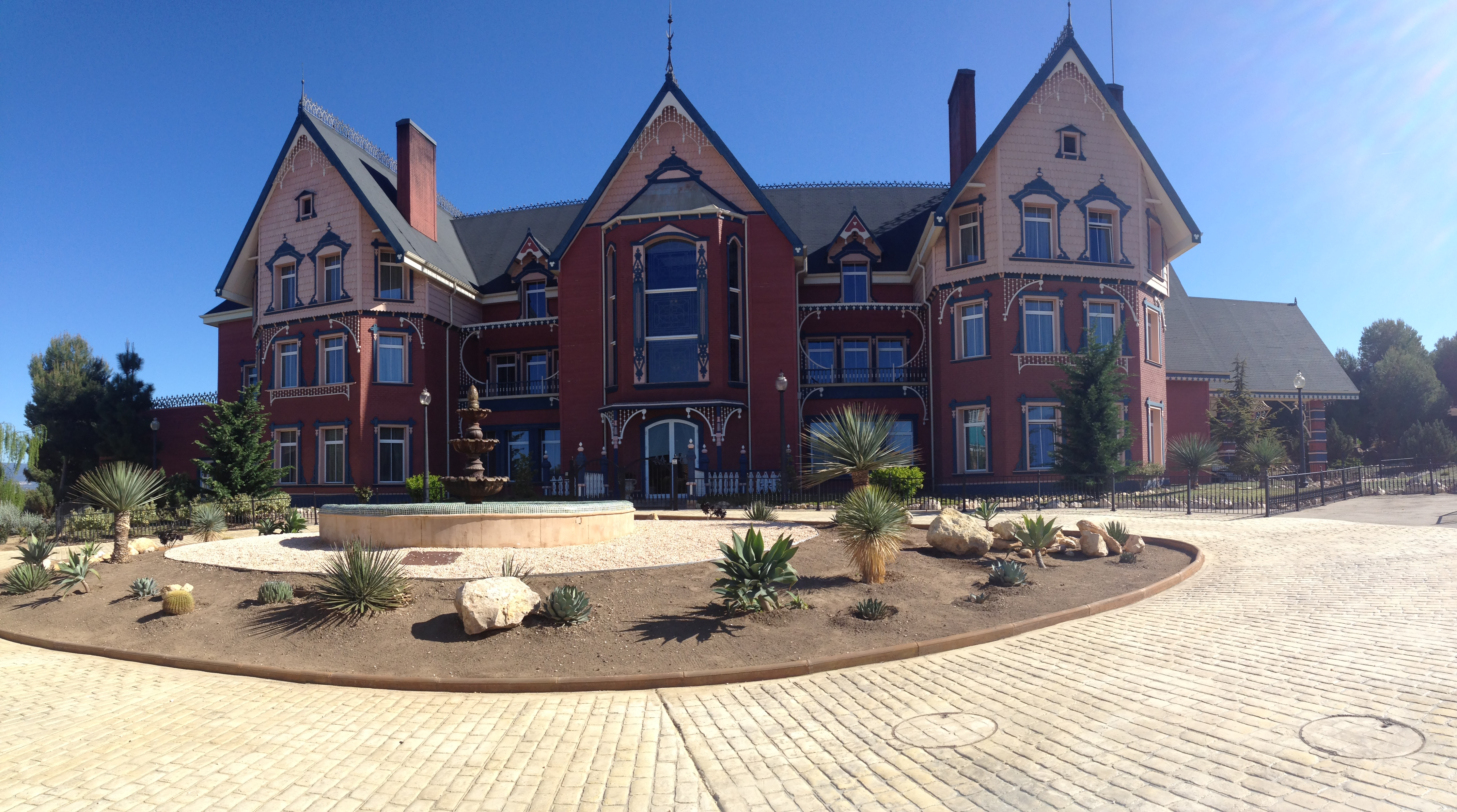 mansion de lucy